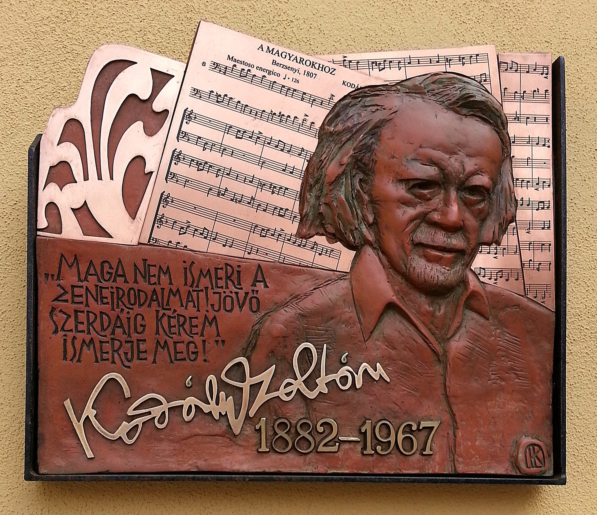 Kodály Zoltán emléktáblája a Szent Lukács Gyógyfürdőben (Krajcsovics Károly alkotása)